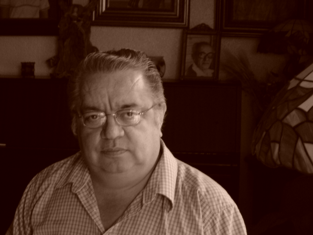 Fotografia tomada por mi del artista en su casa.